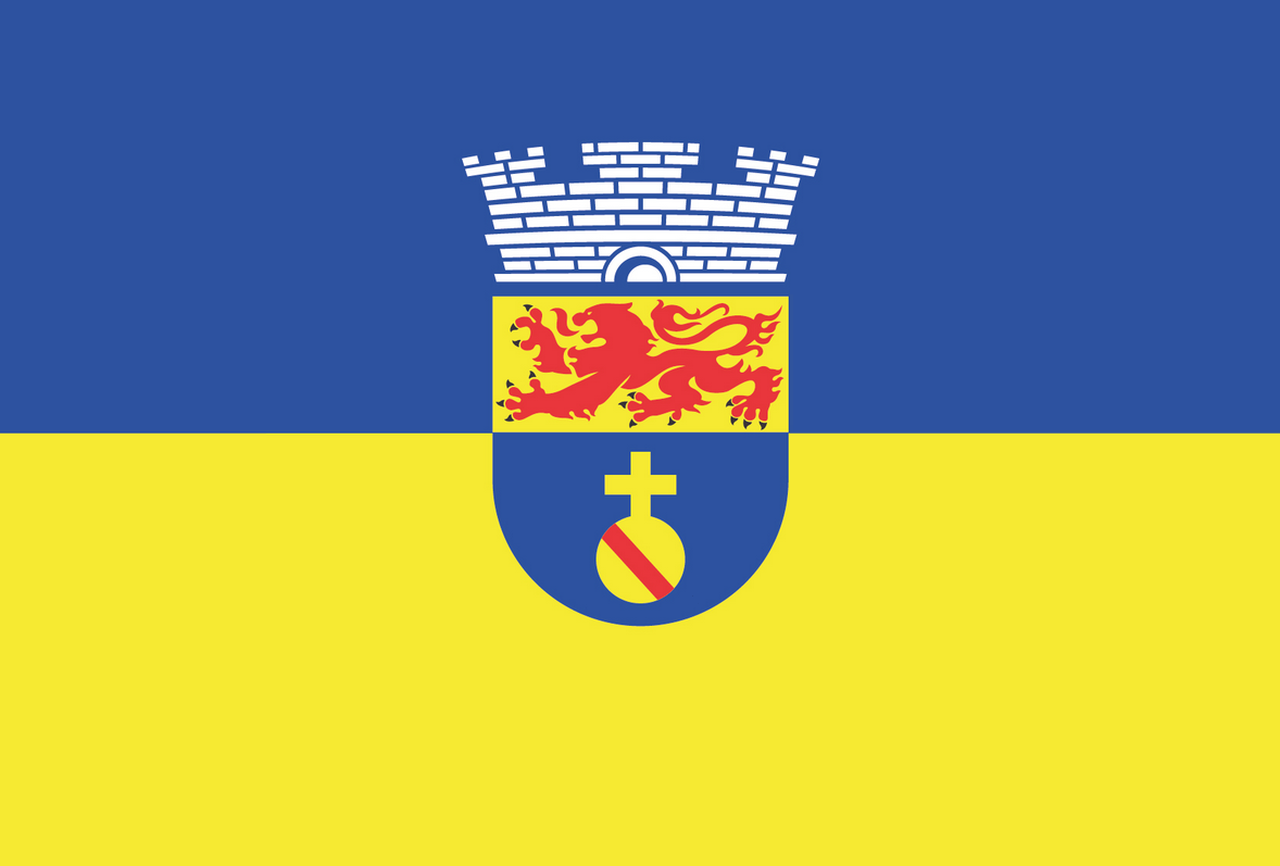 Bandeira do município de Olinda, Pernambuco, Brasil, criada pela Lei n° 2388/1963, quando era prefeito do município o sr. Eufrásio Barbosa